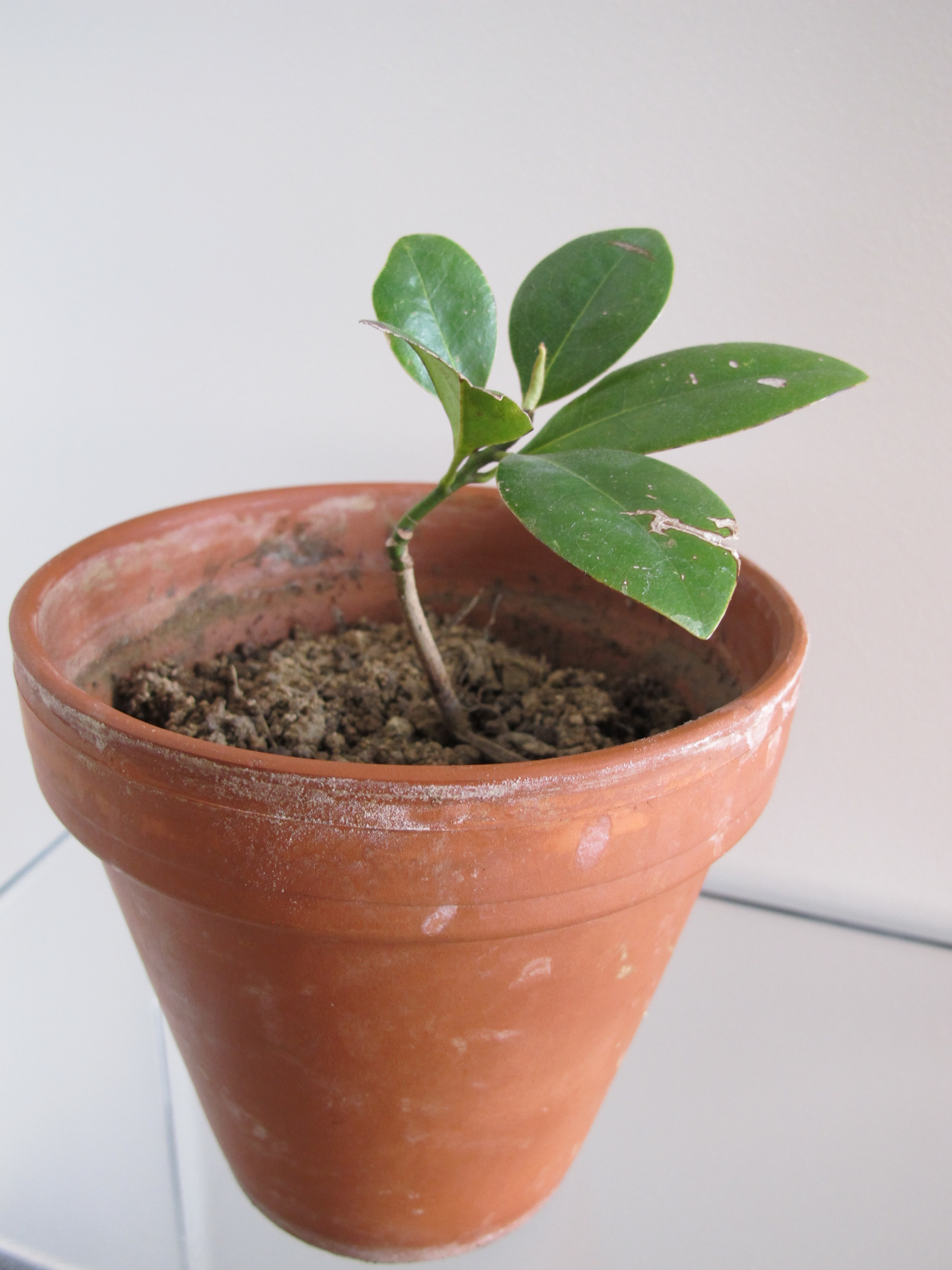 Jeune pousse sauvage de Magnolia grandiflora mise en pot.